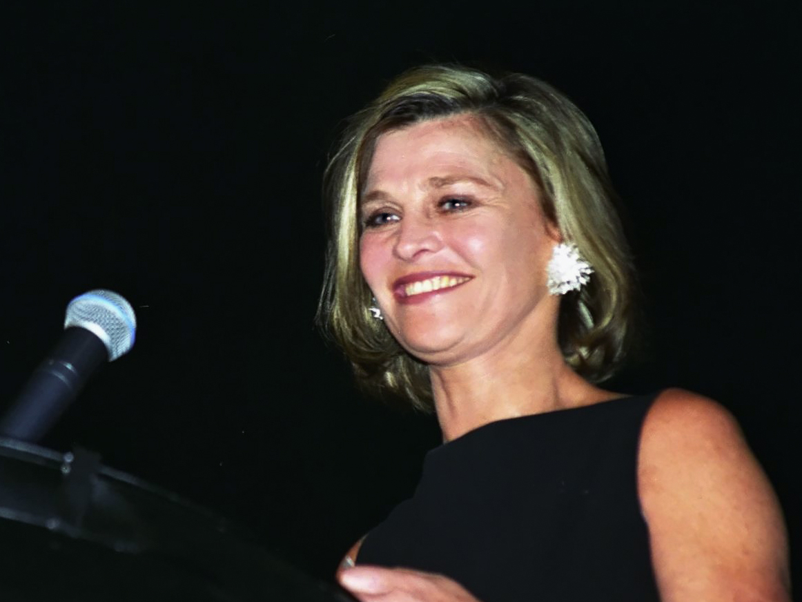 1997 XII Muestra de Cine Mexicano en Guadalajara Ceremonia de clausura y premiación Julie Christie (actriz invitada).